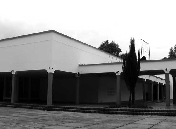 Panorámica del Museo de Arte Universidad Nacional de Colombia, ubicado en el campus universitario de la ciudad de Bogotá, Colombia. Título de la imagen: museo de arte Autor de la fotografía: user: Jaques Sabon año de publicación: 2005